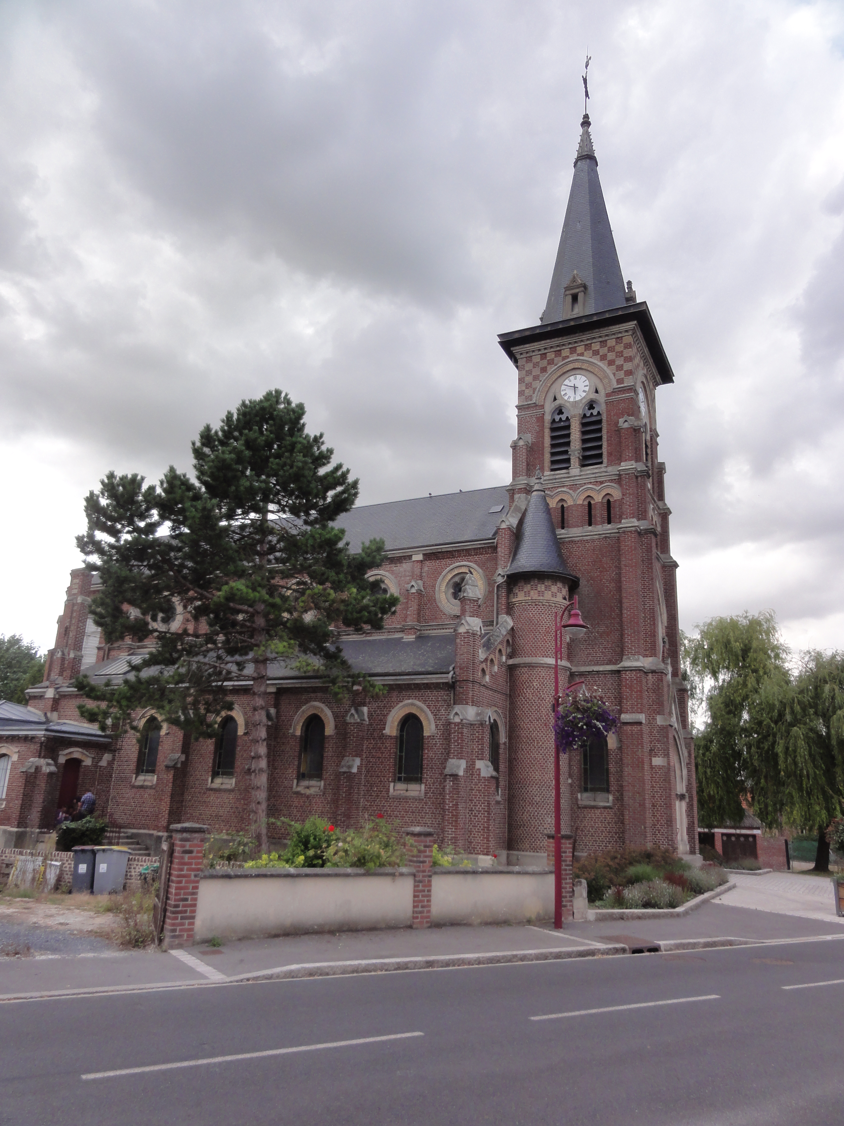 Grugies (Aisne) église Saint-Martin